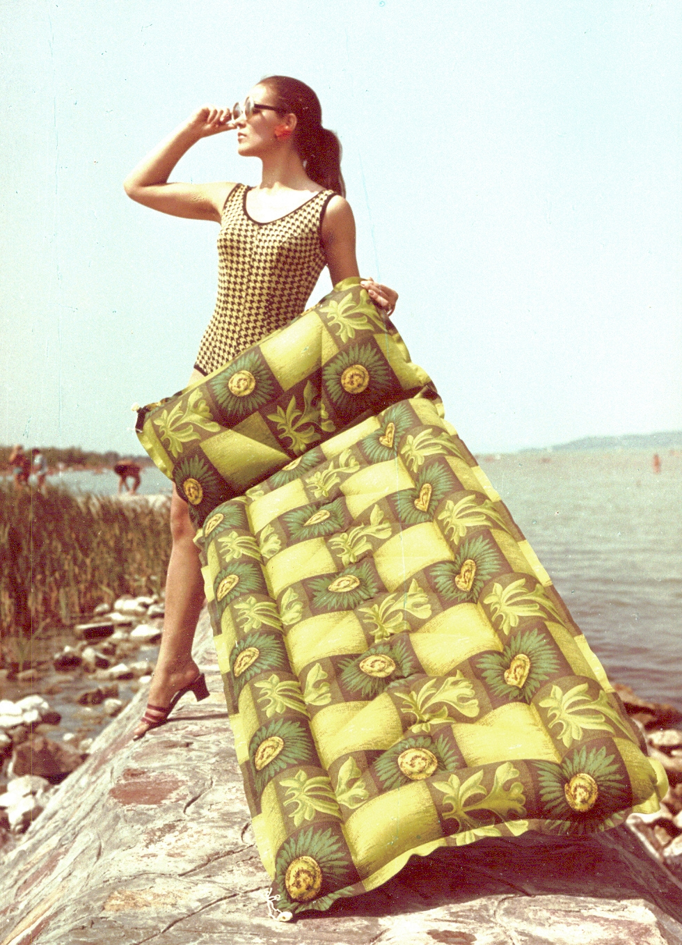 A Palma Gumigyár reklámfotója. Location: Hungary Tags: ad, colorful Title: A Palma Gumigyár reklámfotója.